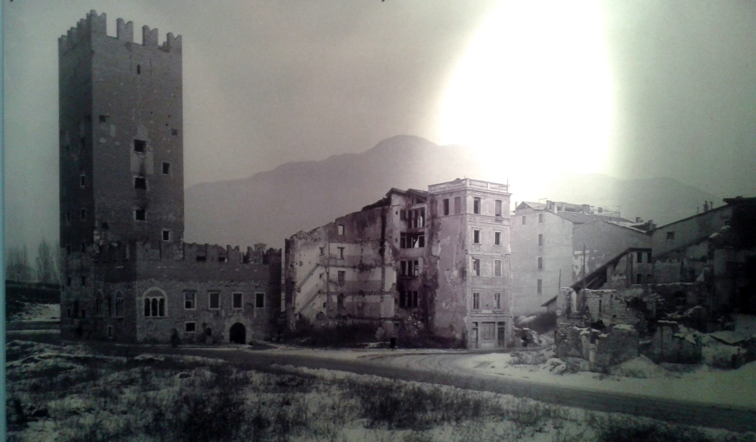 Trento - Torre Vanga 1943